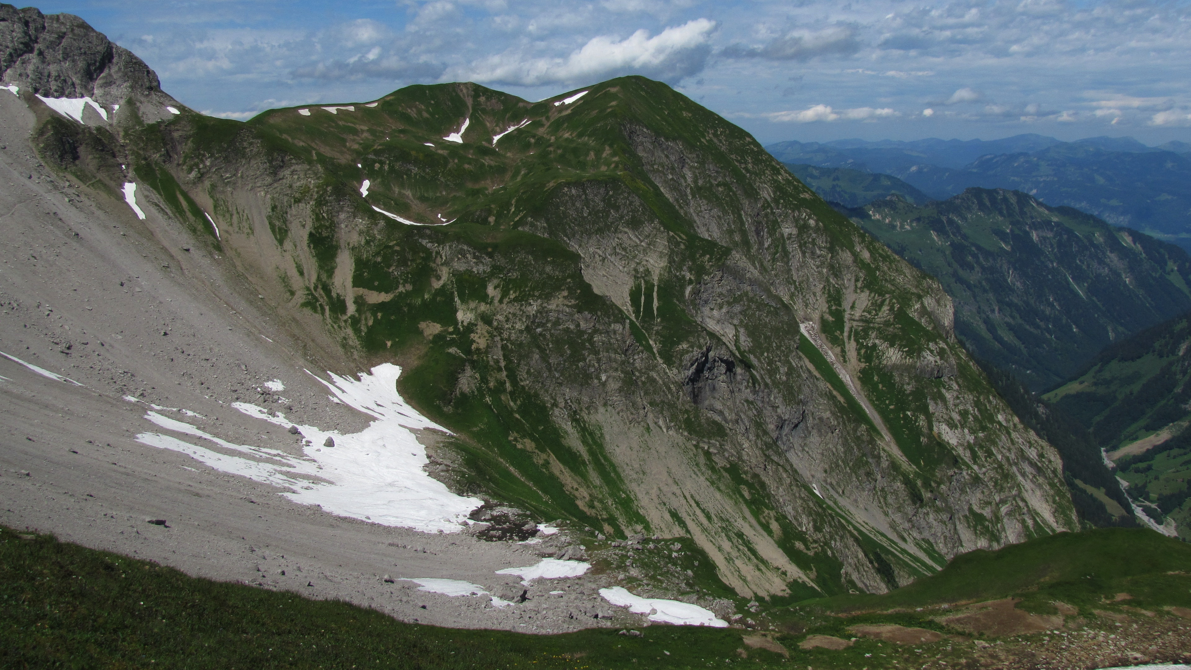 Blick vom Kreuzeck nach Westen auf den Fürschießer (2271 m).